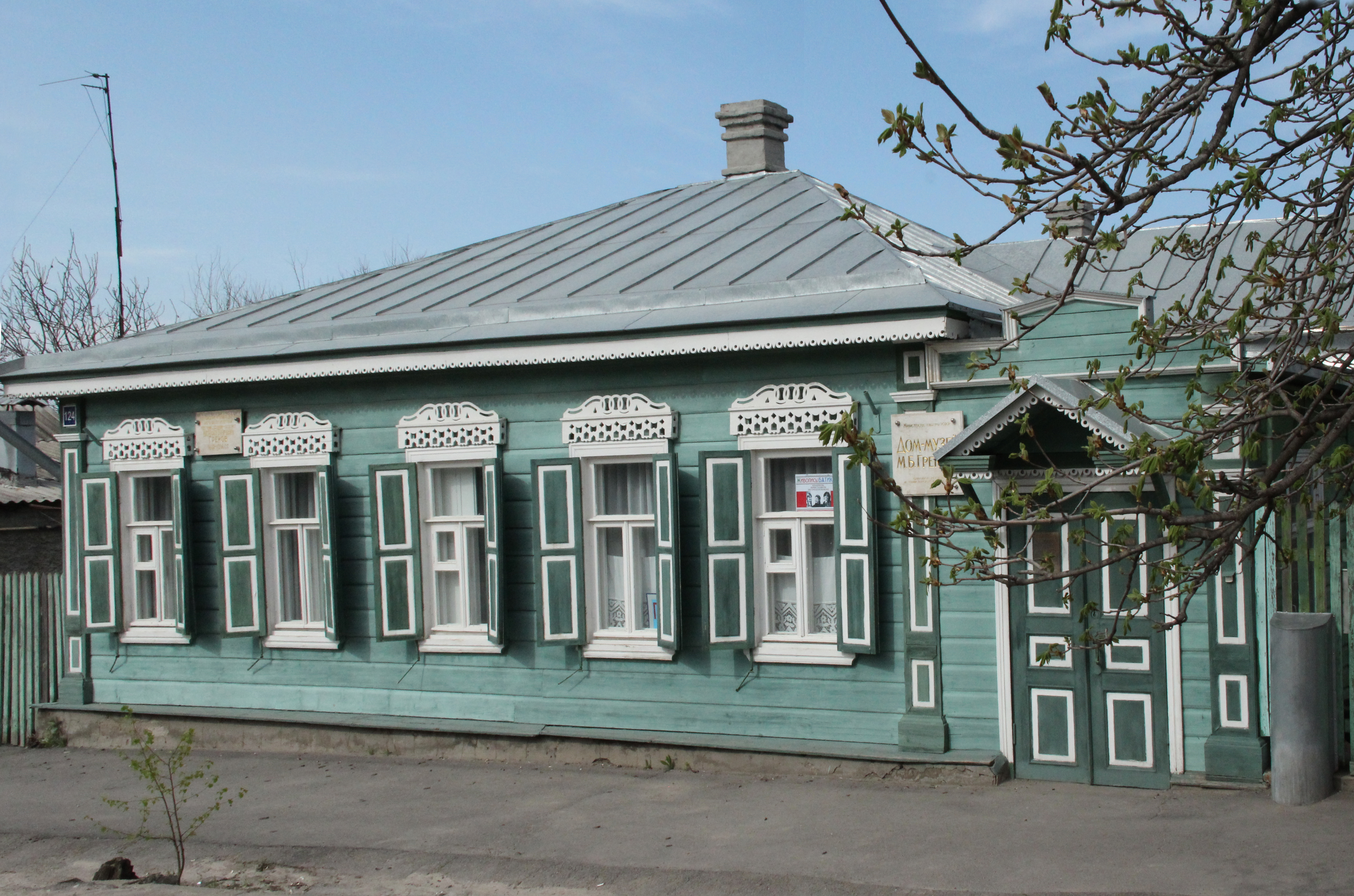 Флигель: улица Грекова, 124, Новочеркасск, Ростовская область